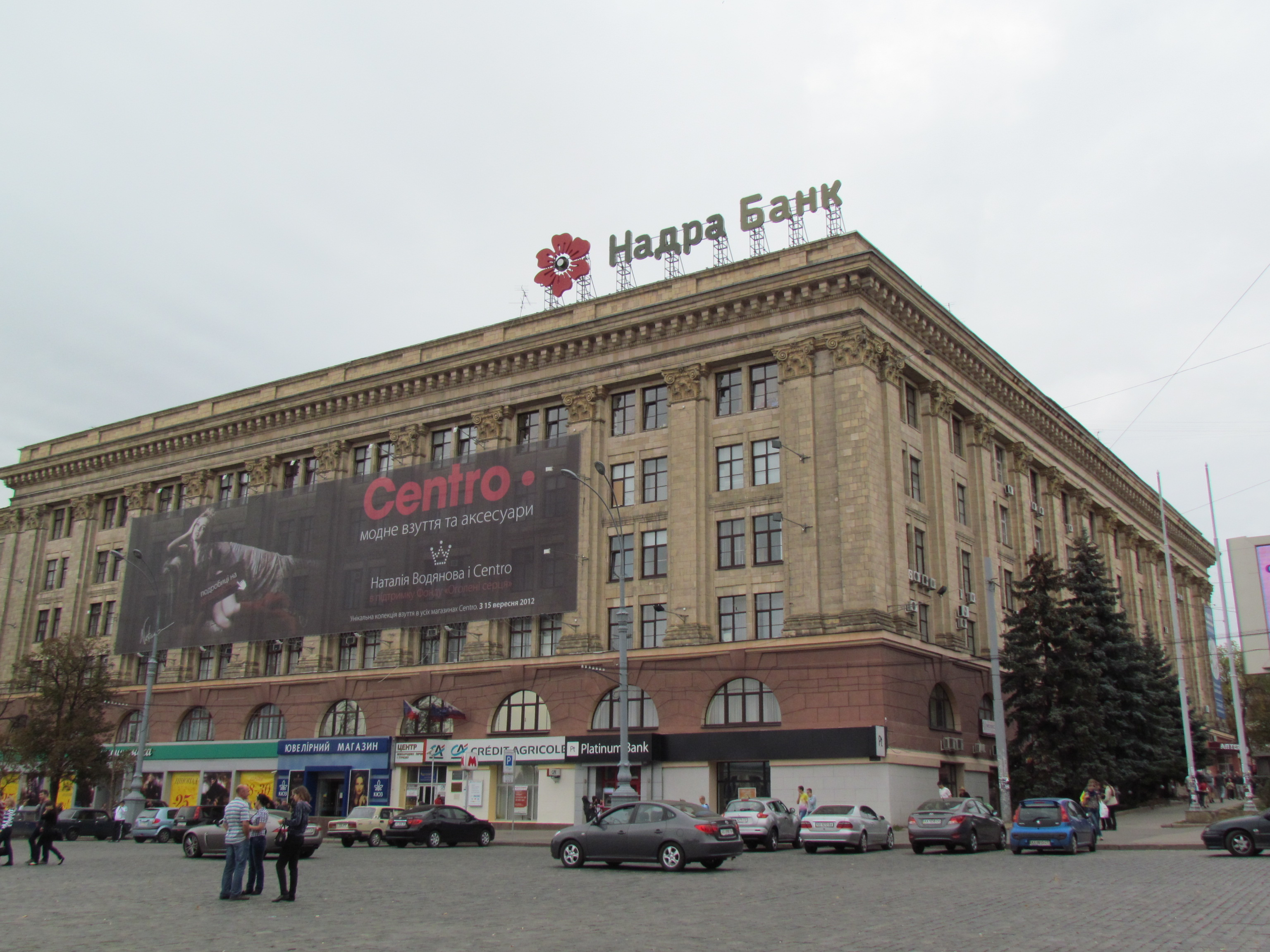 Україна, Харків, вул. Сумська, 39